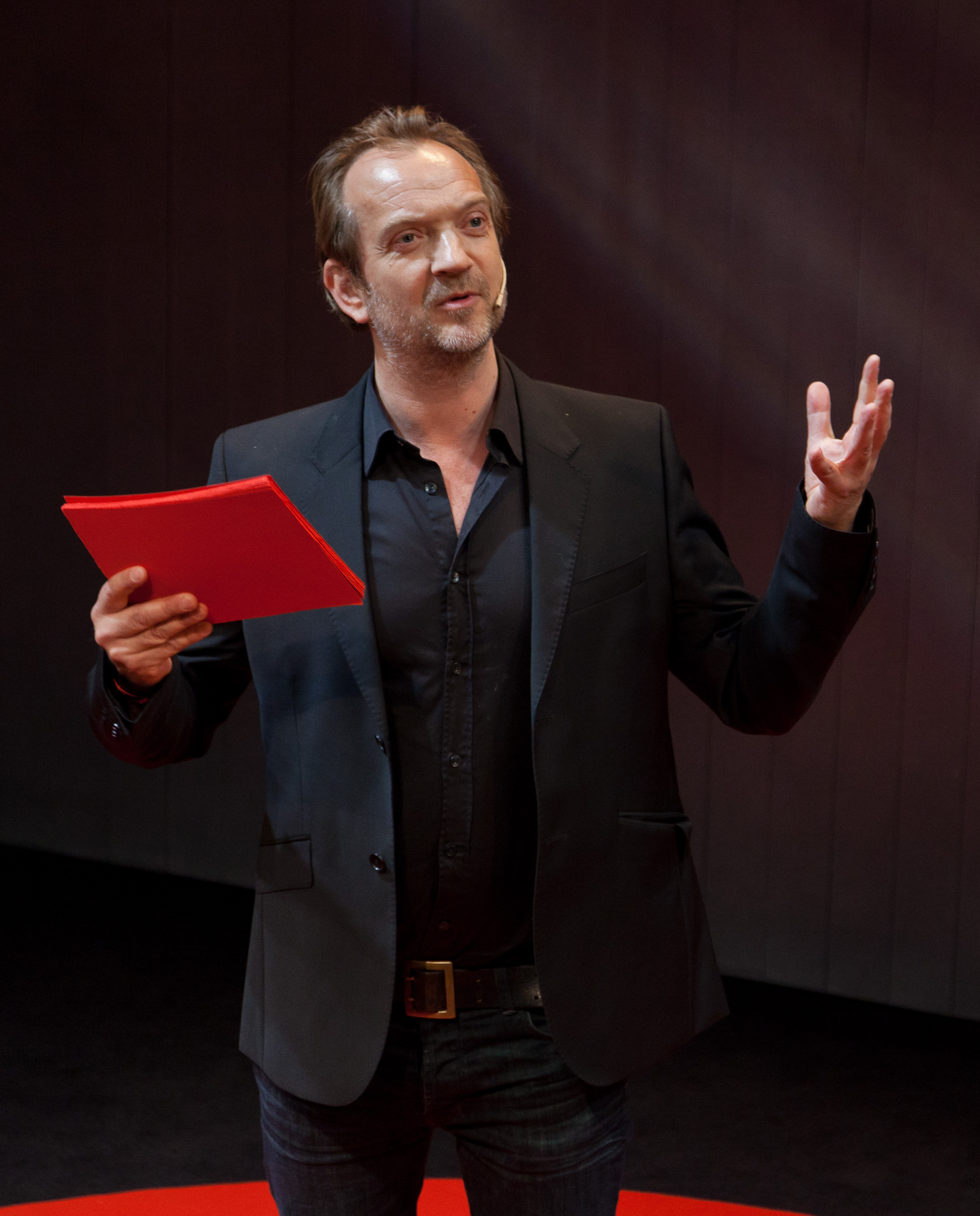 Gard Eidsvold (født 7. mai 1966) er en norsk skuespiller og instruktør.